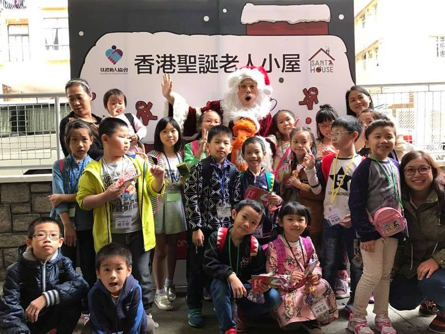 此照片拍攝於以禮助人協會聖誕小屋慈善場